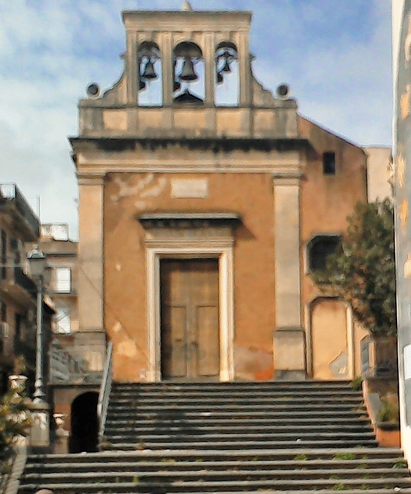 La chiesa di San Rocco - Misterbianco